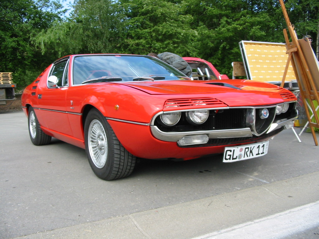 Foto is gemaakt door Marvin Raaijmakers tijdens Spa Italia 2005 te Francorchamps.